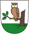 Znak města Jílové (okr. Děčín)